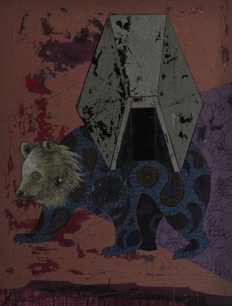 Cuadro de Juan Miguel Pozo.